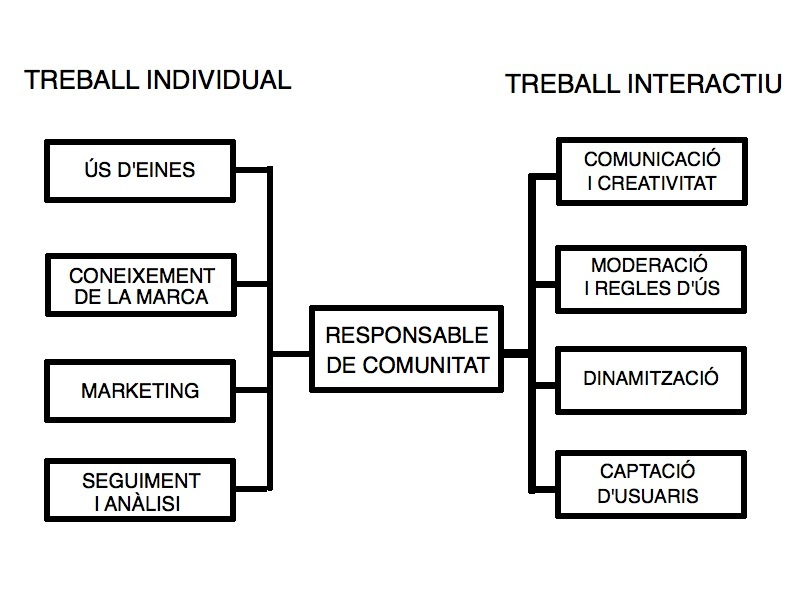 Diagrama de la feina d'un responsable de comunitat